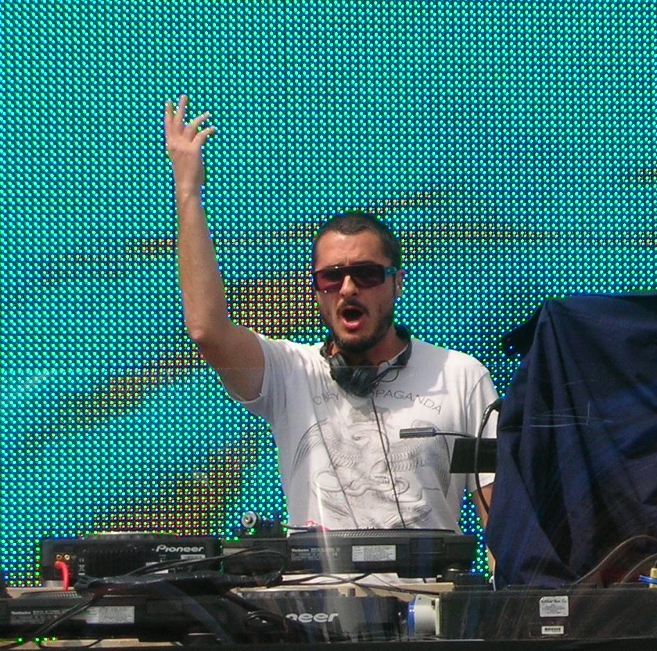 Zane Lowe